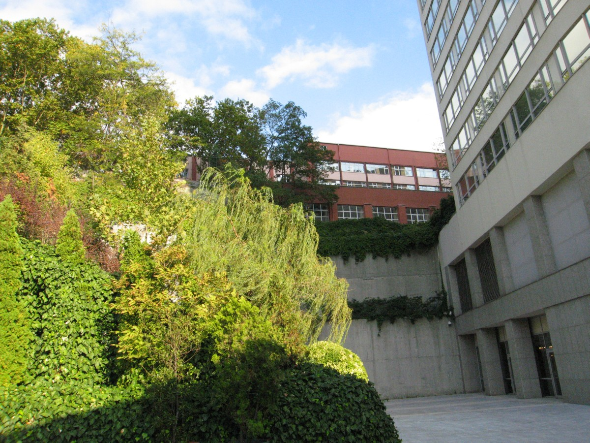 Beşiktaş Atatürk Anatolian High School's main building in Istanbul, Turkey.